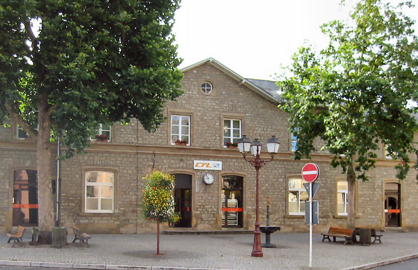 Bâtiment voyageurs et entrée de la gare d'Ettelbruck au Luxembourg.